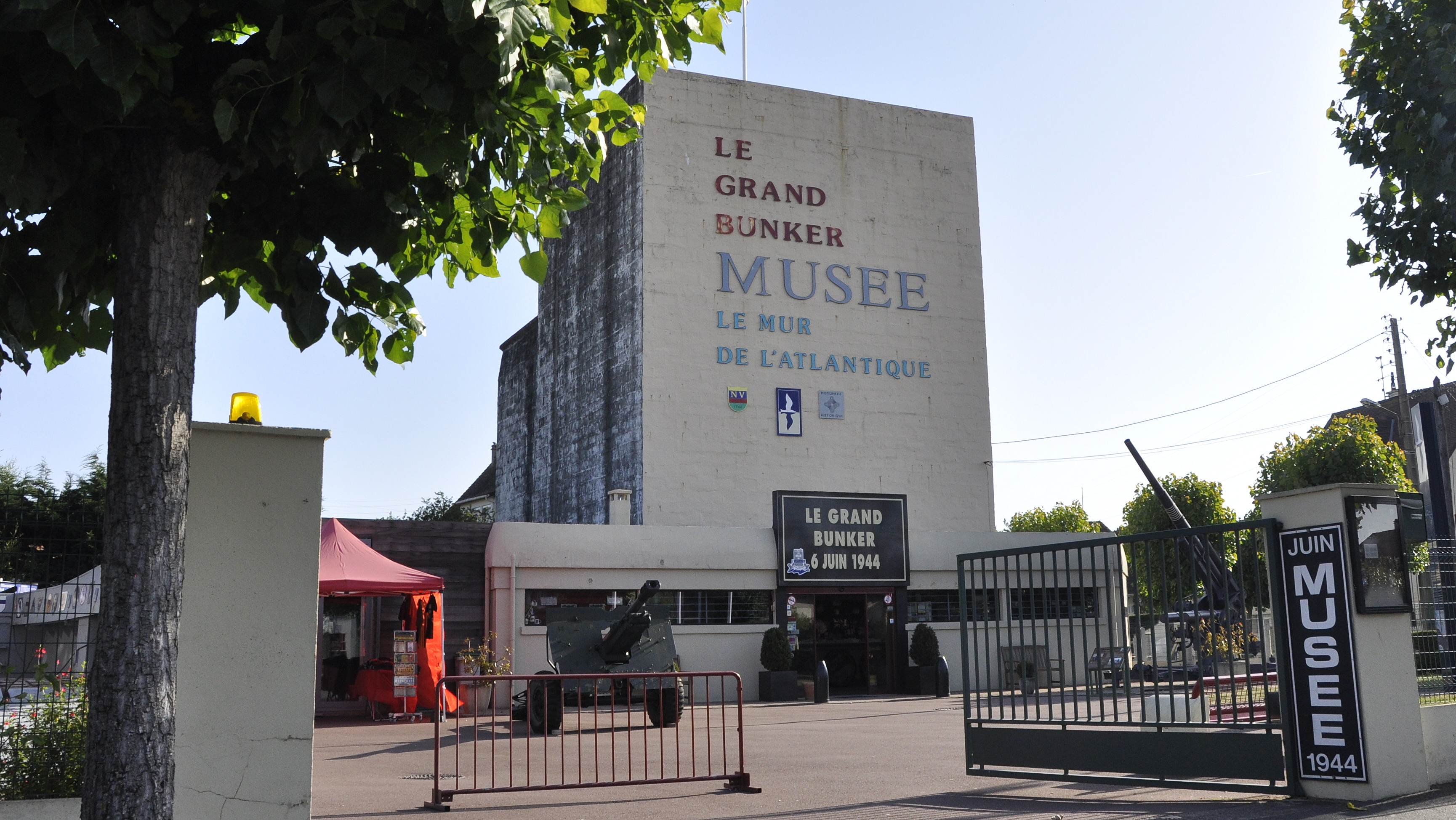 Musée du Mur de l'Atlantique te Ouistreham, Frankrijk